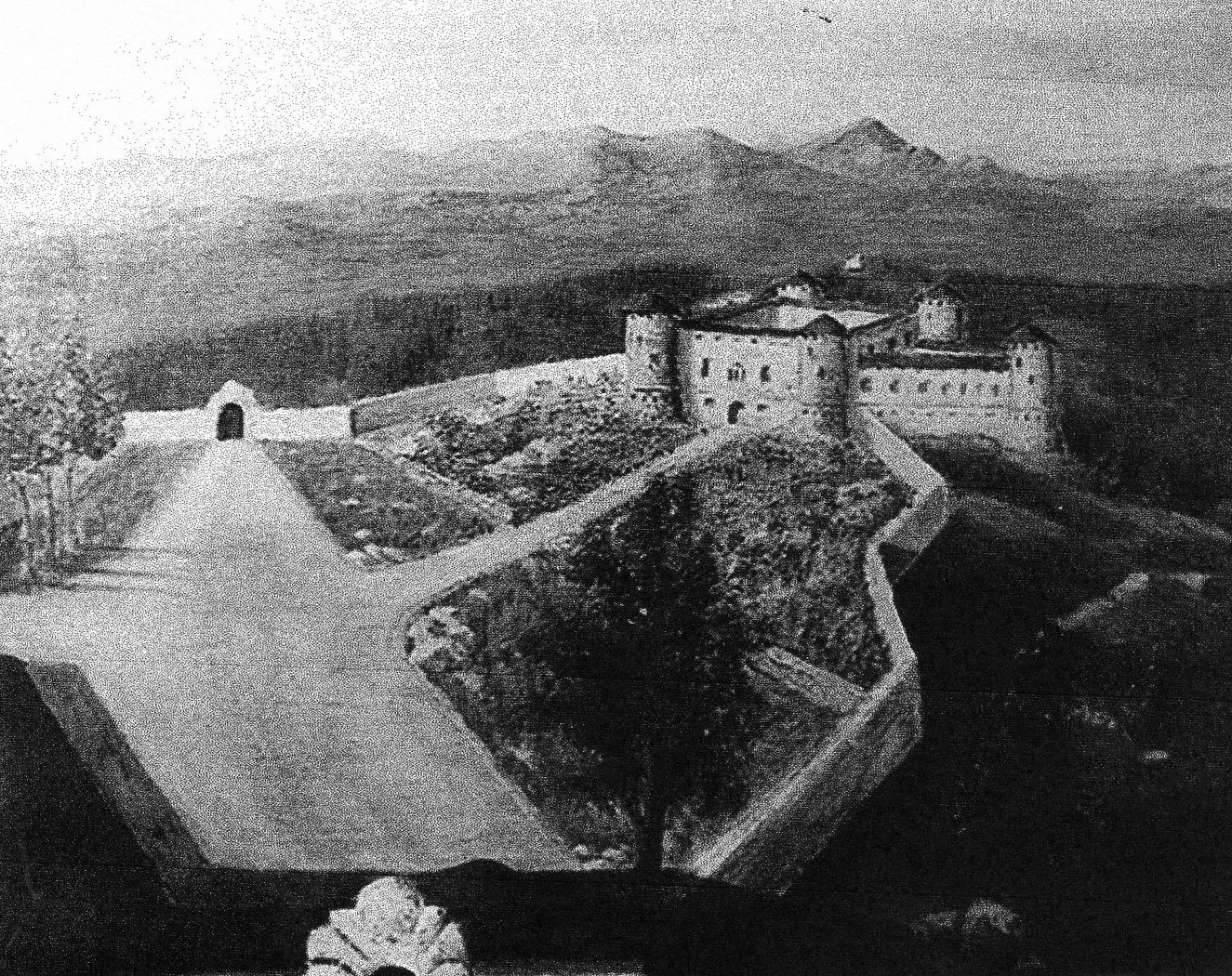 il castello di Masserano (Piemonte)